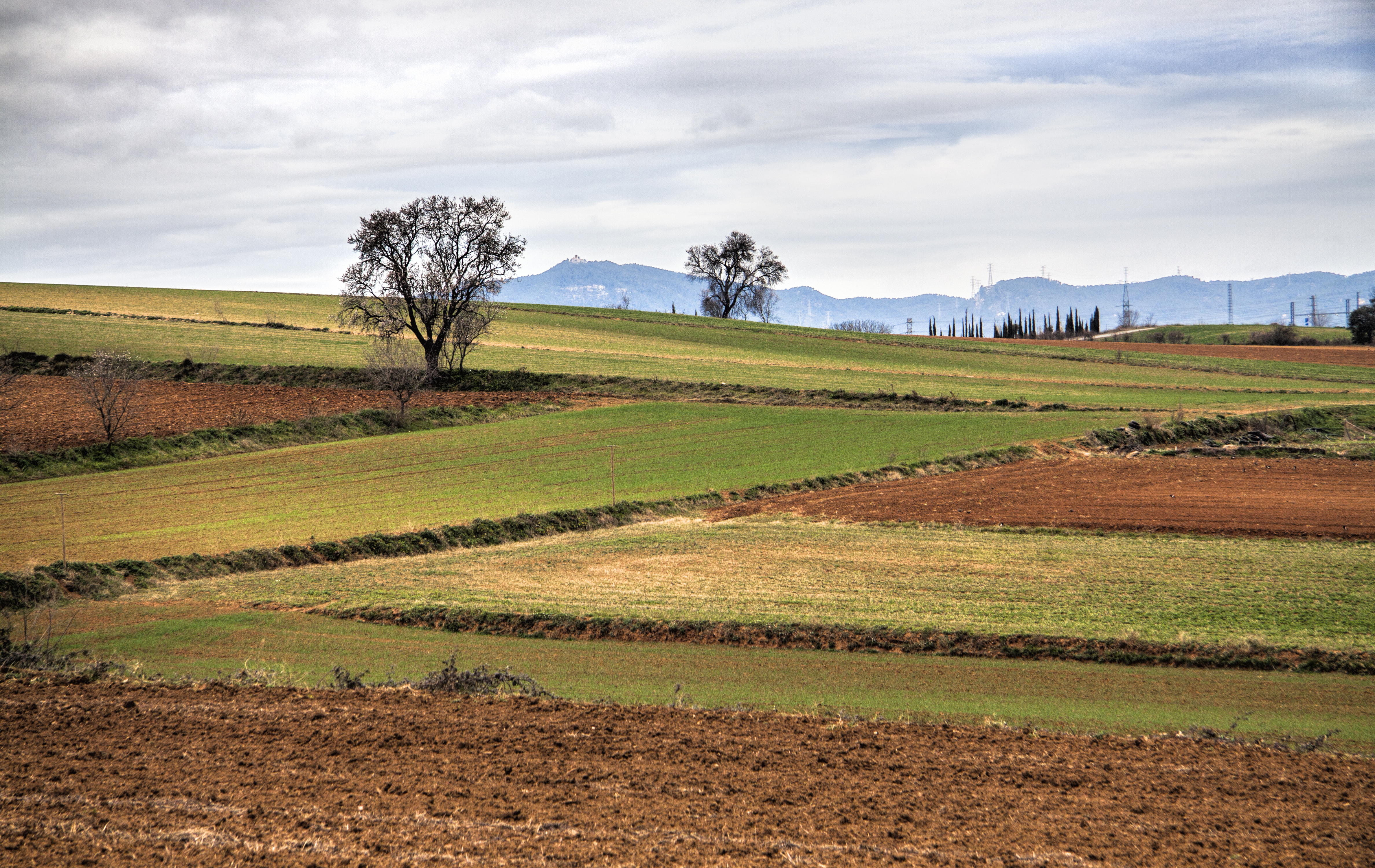 Espai rural de Gallecs This is a a photo of a natural area in Catalonia, Spain, with id: ES510277